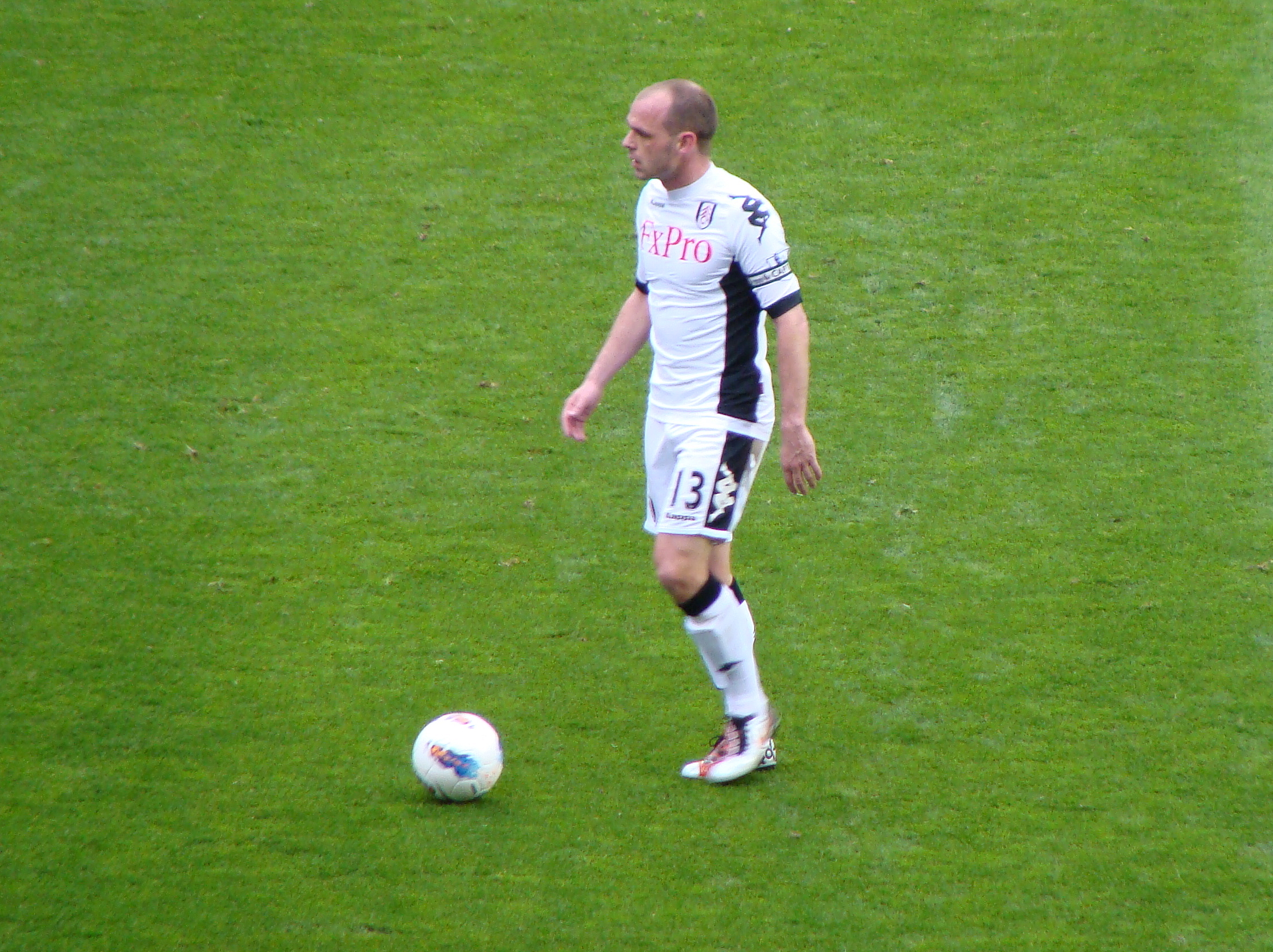 Danny Murphy in March 2012.